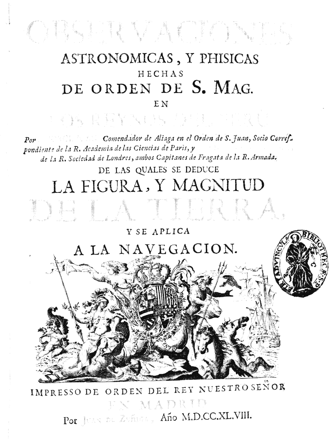 Frontespizio